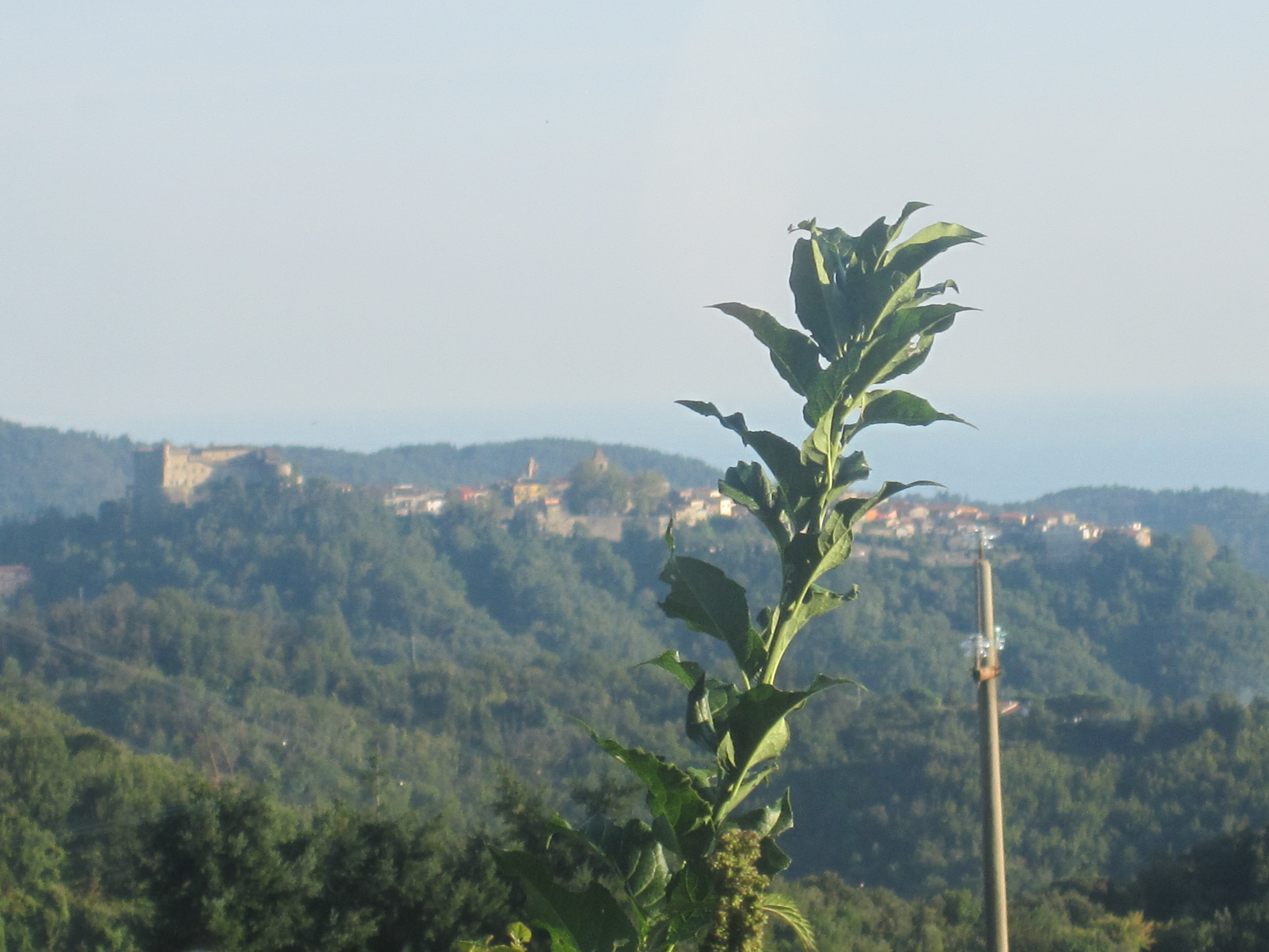 Opera propria, Matteo Tamburini